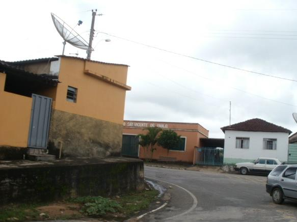 Vista do distrito São Sebastião da Vitória, pertencente a São João del-Rei, Minas Gerais, Brasil.